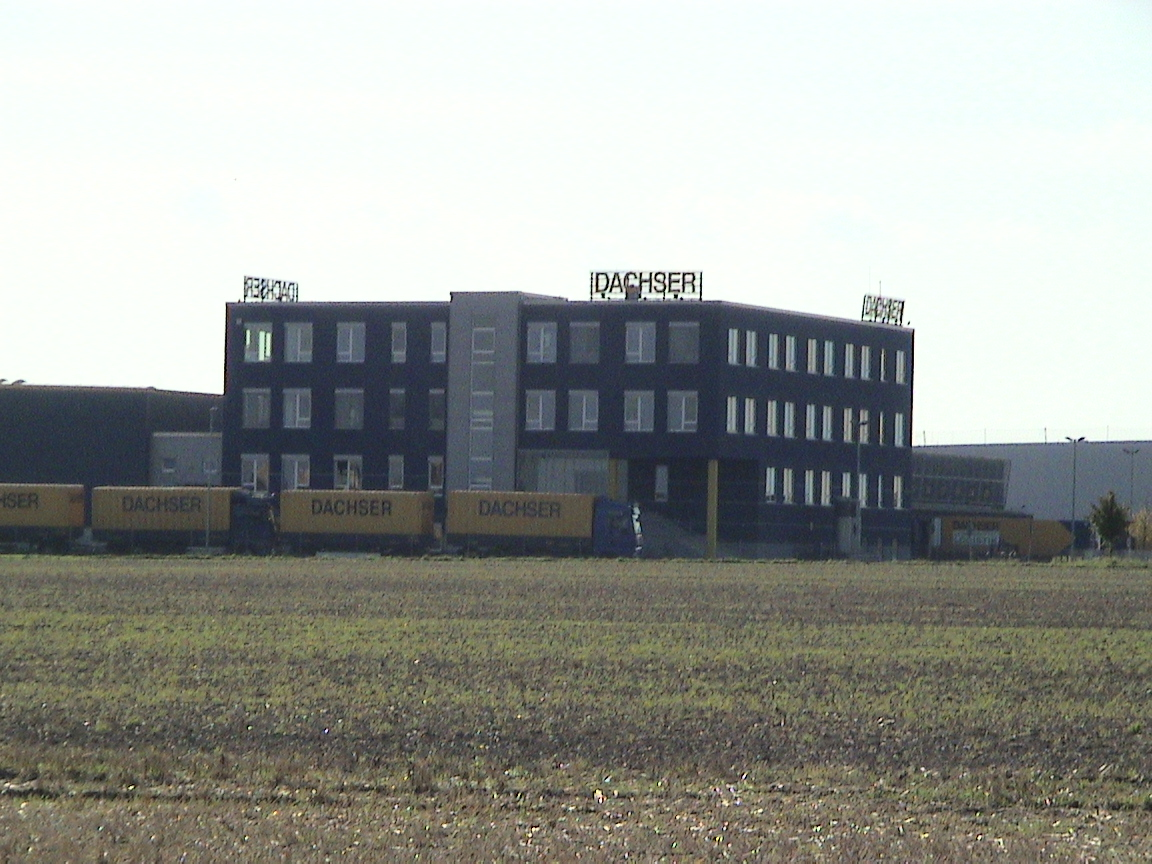 Фирма Даксер. Ганновер.